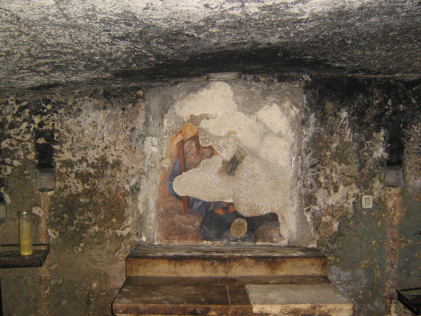 Affreschi nella Cripta dello Spirito Santo a Castiglione d'Otranto (LE)